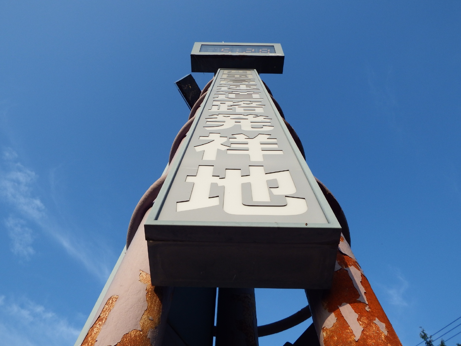 四国高速道路発祥地の碑